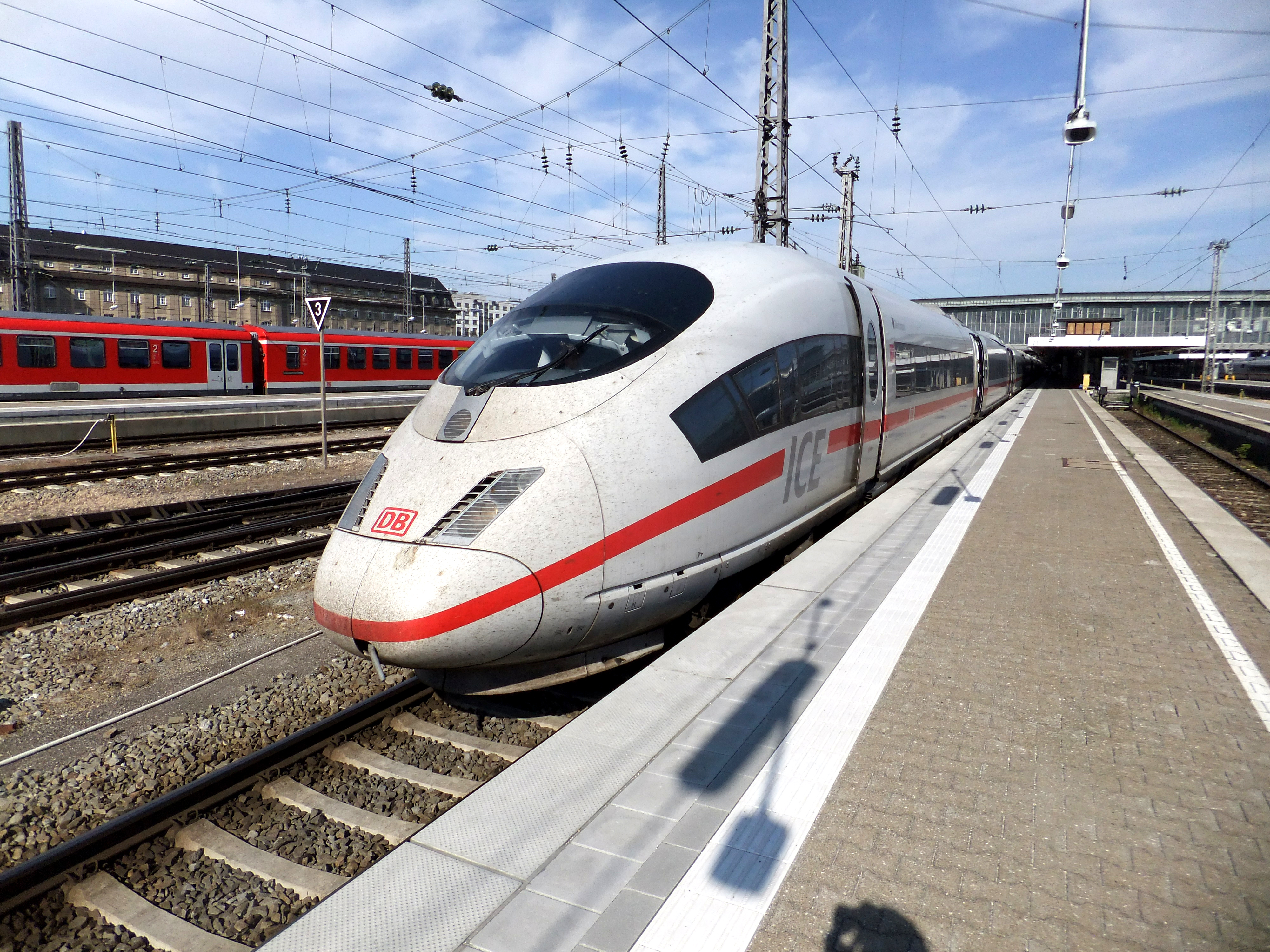 ICE 3 (Tz 303: Dortmund) im Münchener Hauptbahnhof